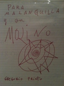 Dibujo original de Gregorio Prieto dedicado a Malanquilla